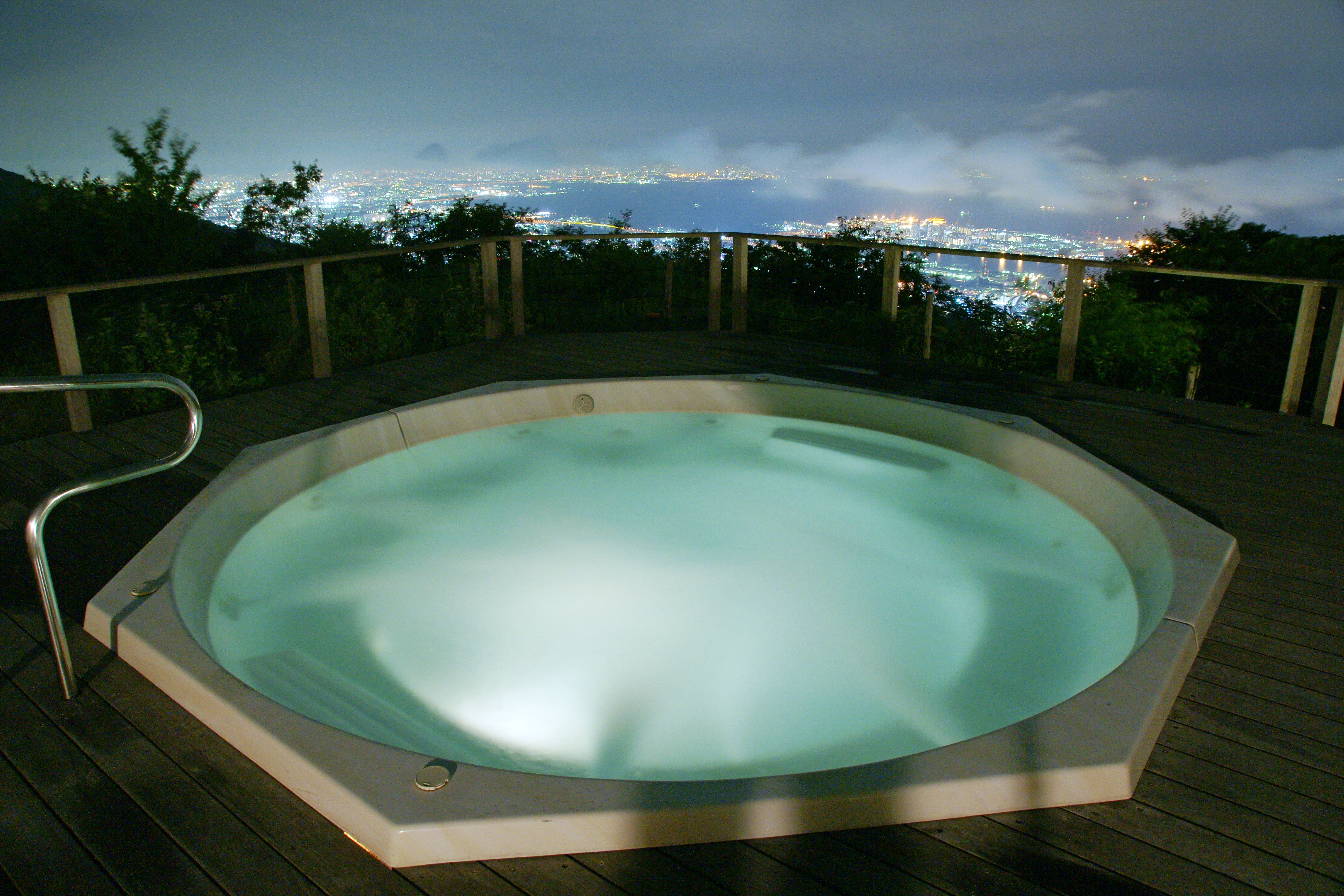 Hotel de Maya, Kobe, Hyogo prefecture, Japan